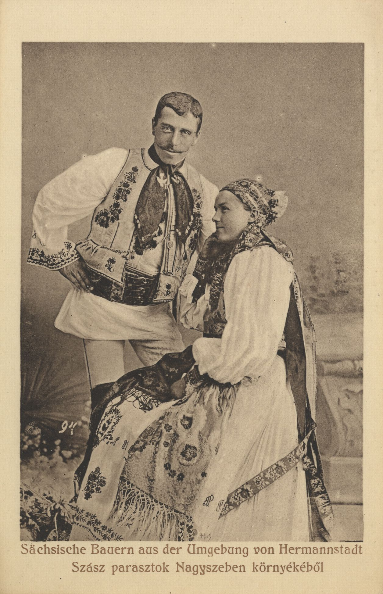 Sächsische Bauern aus der Umgebung von Hermannstadt Costumes of the Transylvania Saxons from Hermannstadt, modern-day Sibiu, Romania.